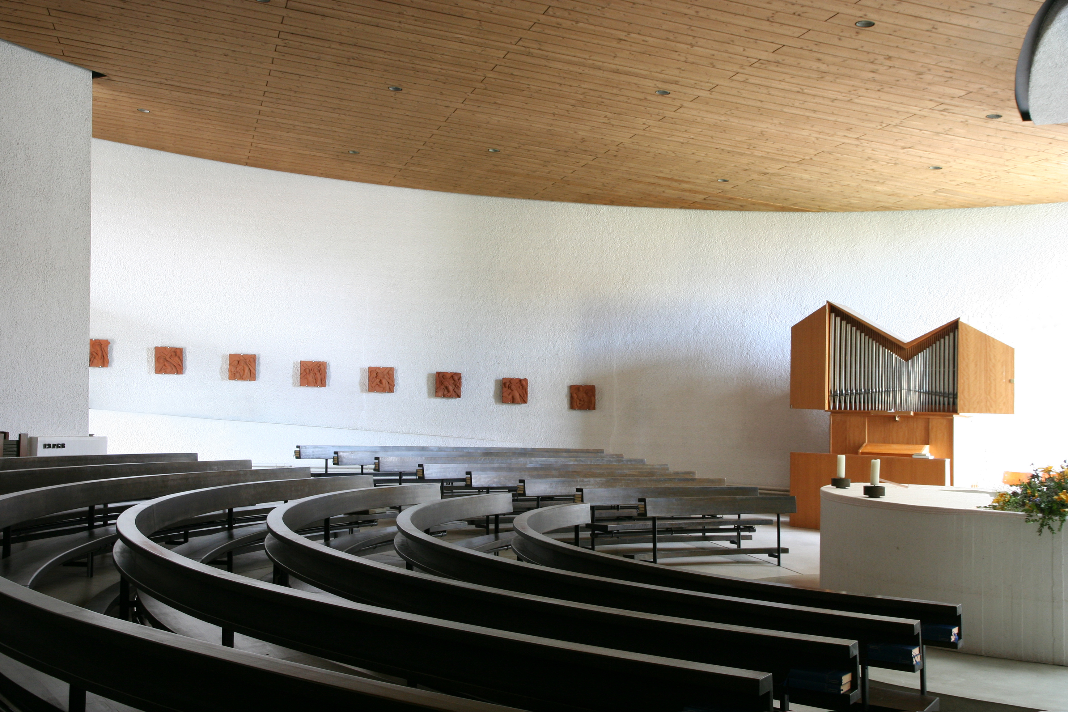 Römisch-katholische Kirche St. Jakobus Hütten ZH